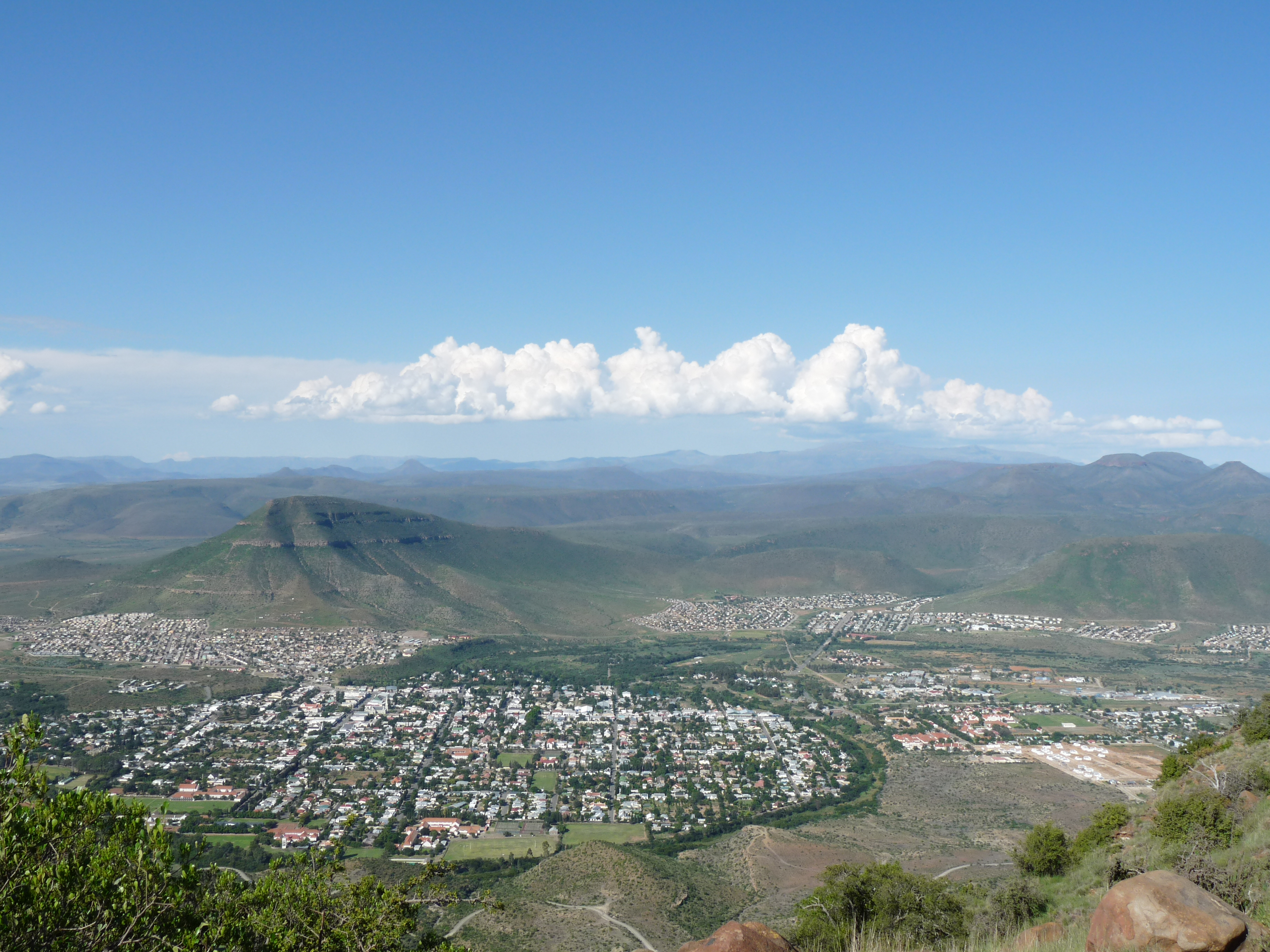 Graaff Reinet